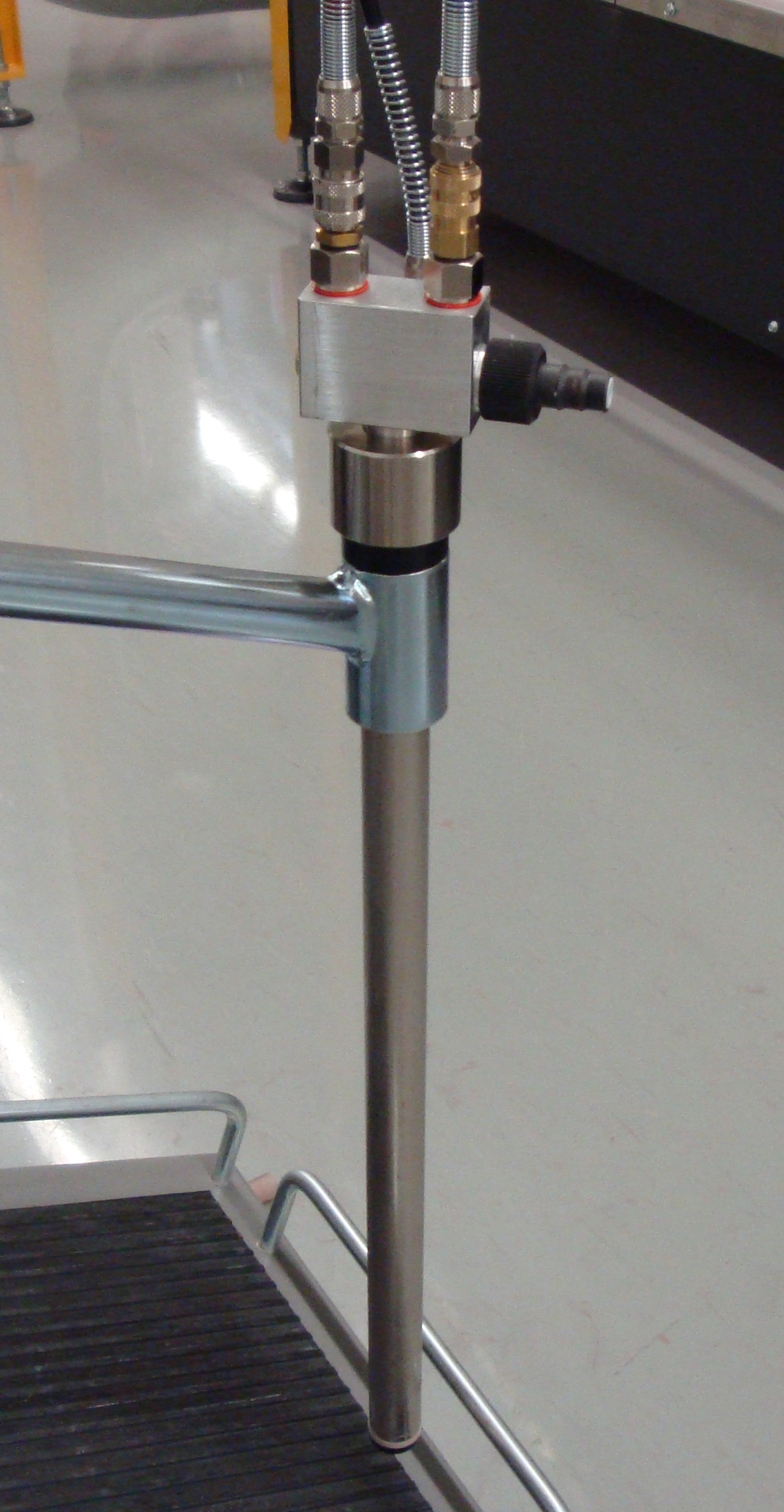 Stabinjektor